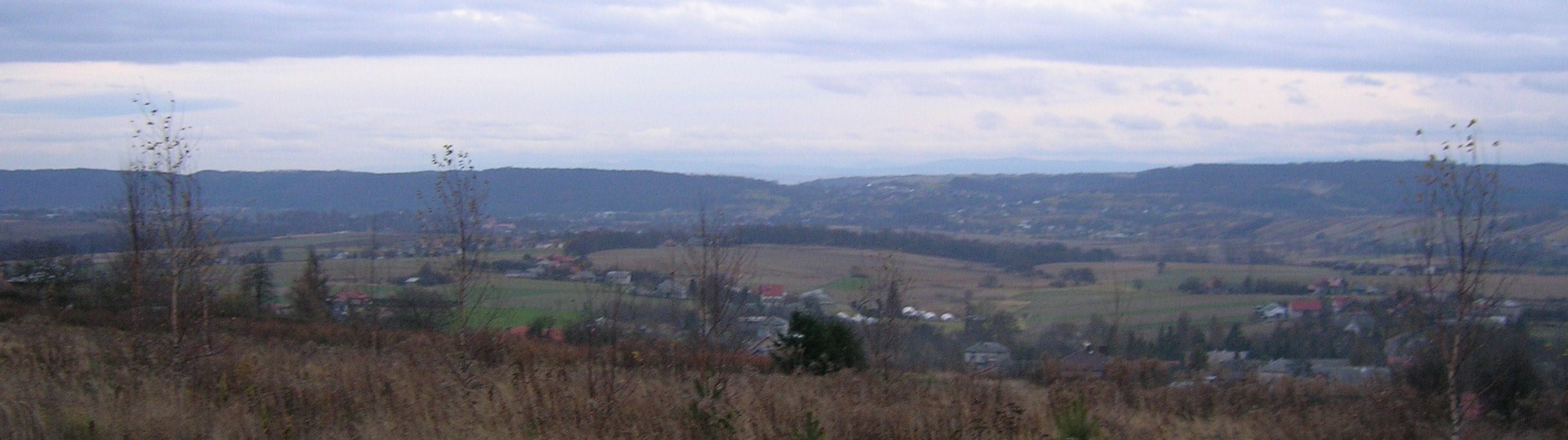 Grzbiet Tenczyński